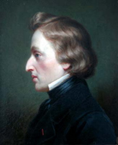 Profil de Frédéric Chopin par Albert Gräfle (1809-1889). Présenté sur la couverture de Frédéric Chopin : « Chapeau bas, Messieurs, un génie... », Michel Pazdro, collection « Découvertes Gallimard / Arts » (n° 70), Éditions Gallimard, 1989.